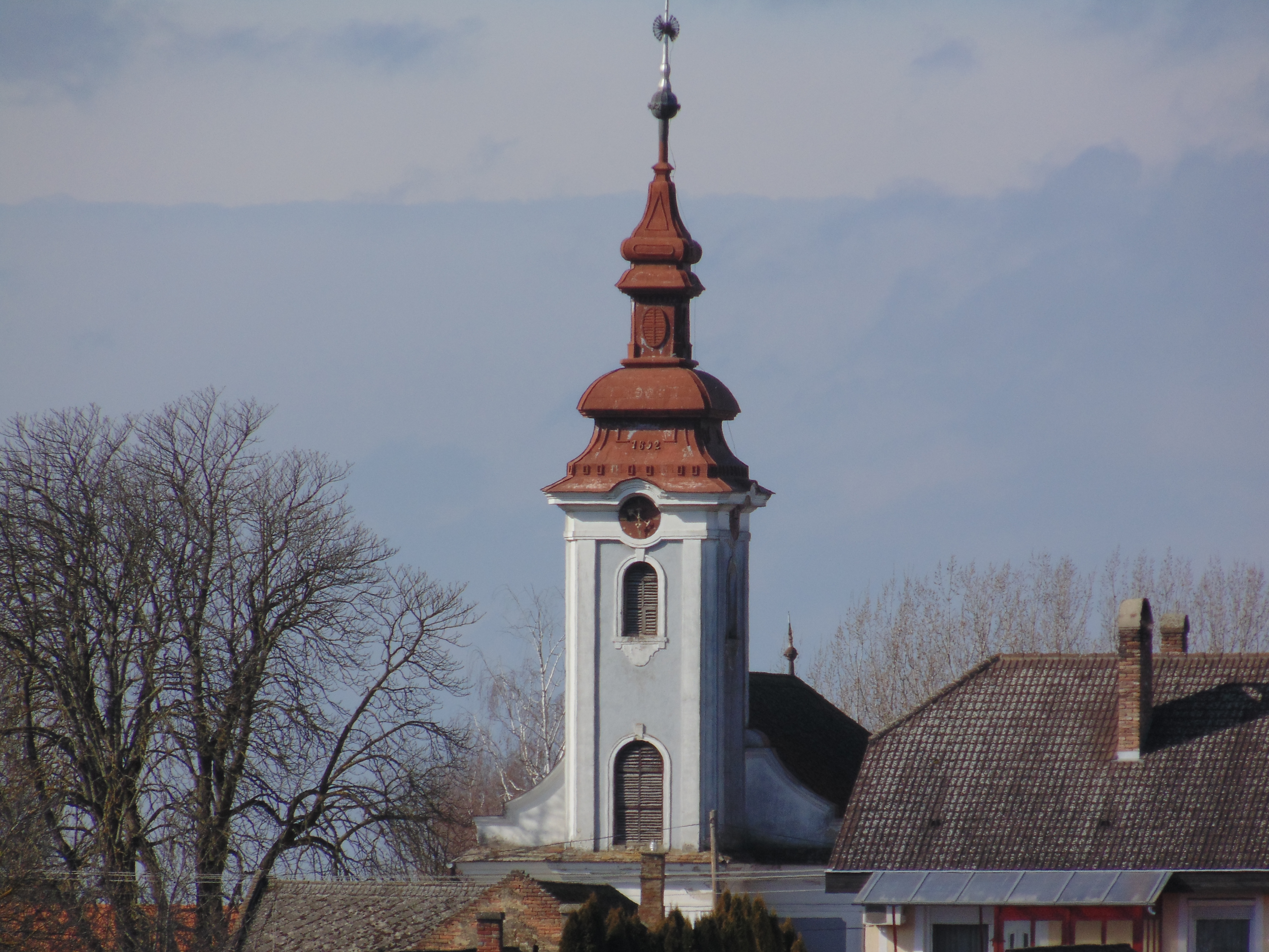 A somogyaszalói Református Templom épülete a Szőlőhegyről fényképezve.